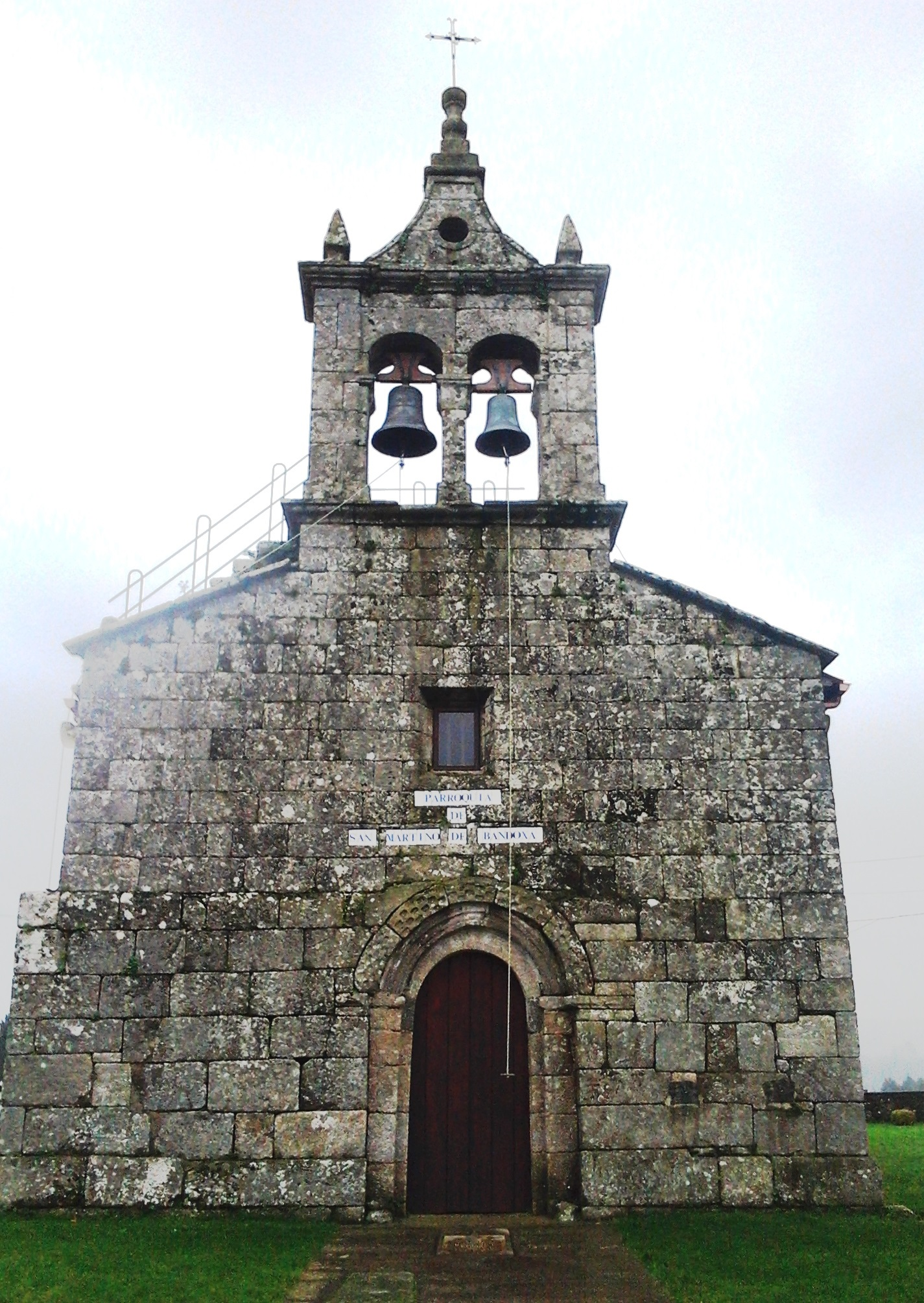 Igrexa romanica da parroquia de Bandoxa, concello de Oza-Cesuras